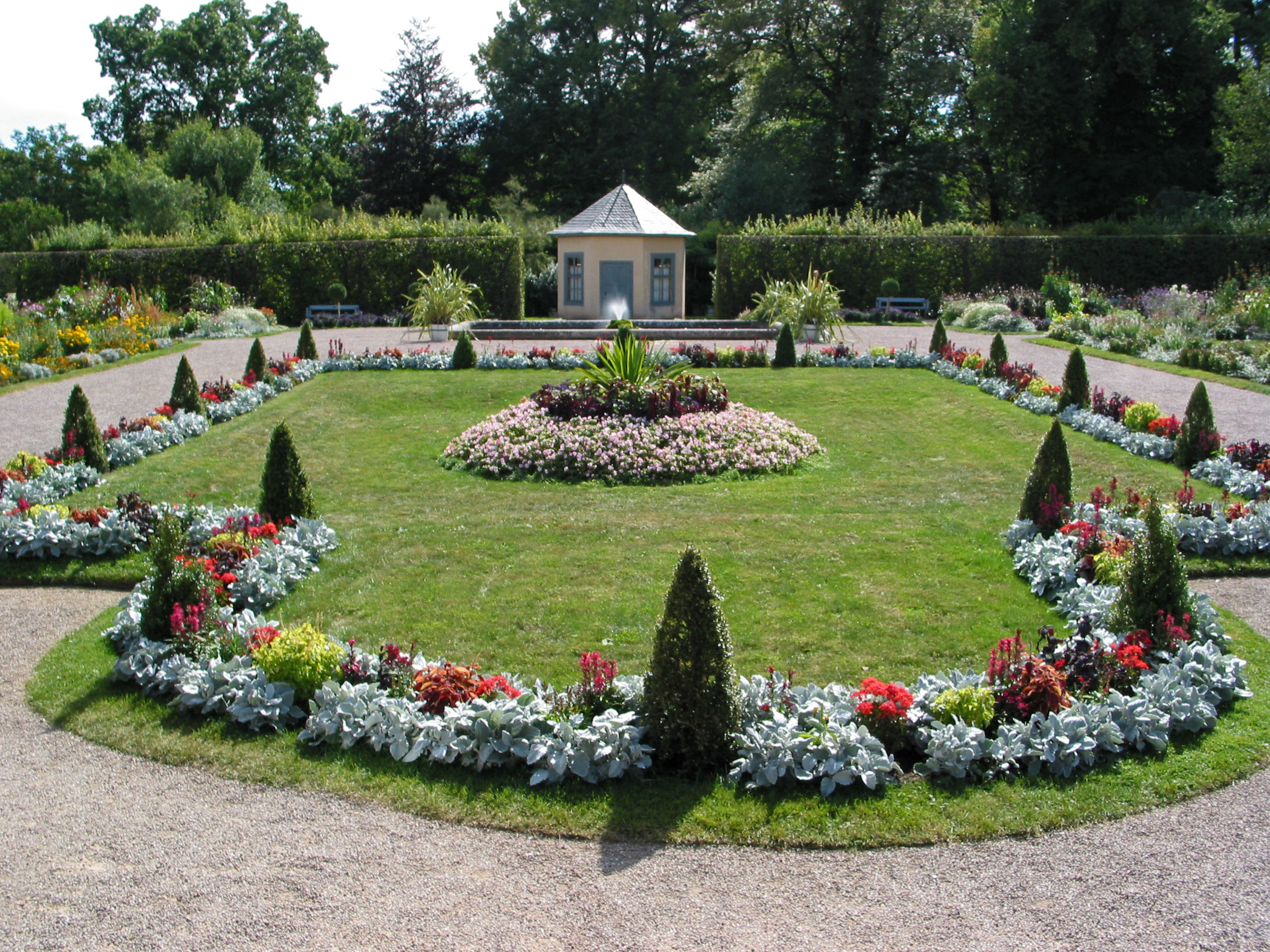 Blumengarten & Pavillon im englischen Landschaftspark des Schlosses Belvedere bei Weimar.